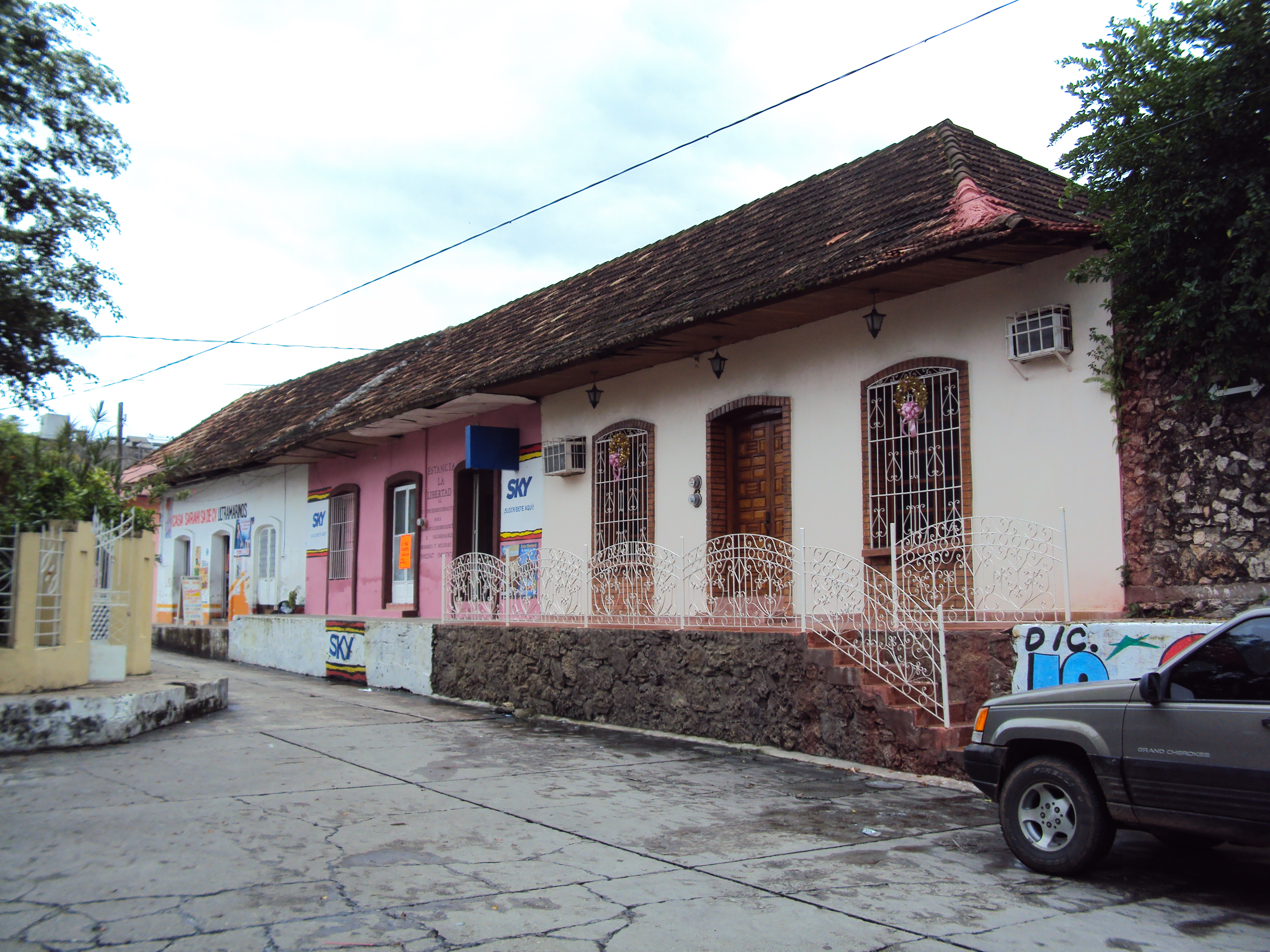 Antiguas casas del centro de la ciudad de Tenosique; datan de principios del siglo XX